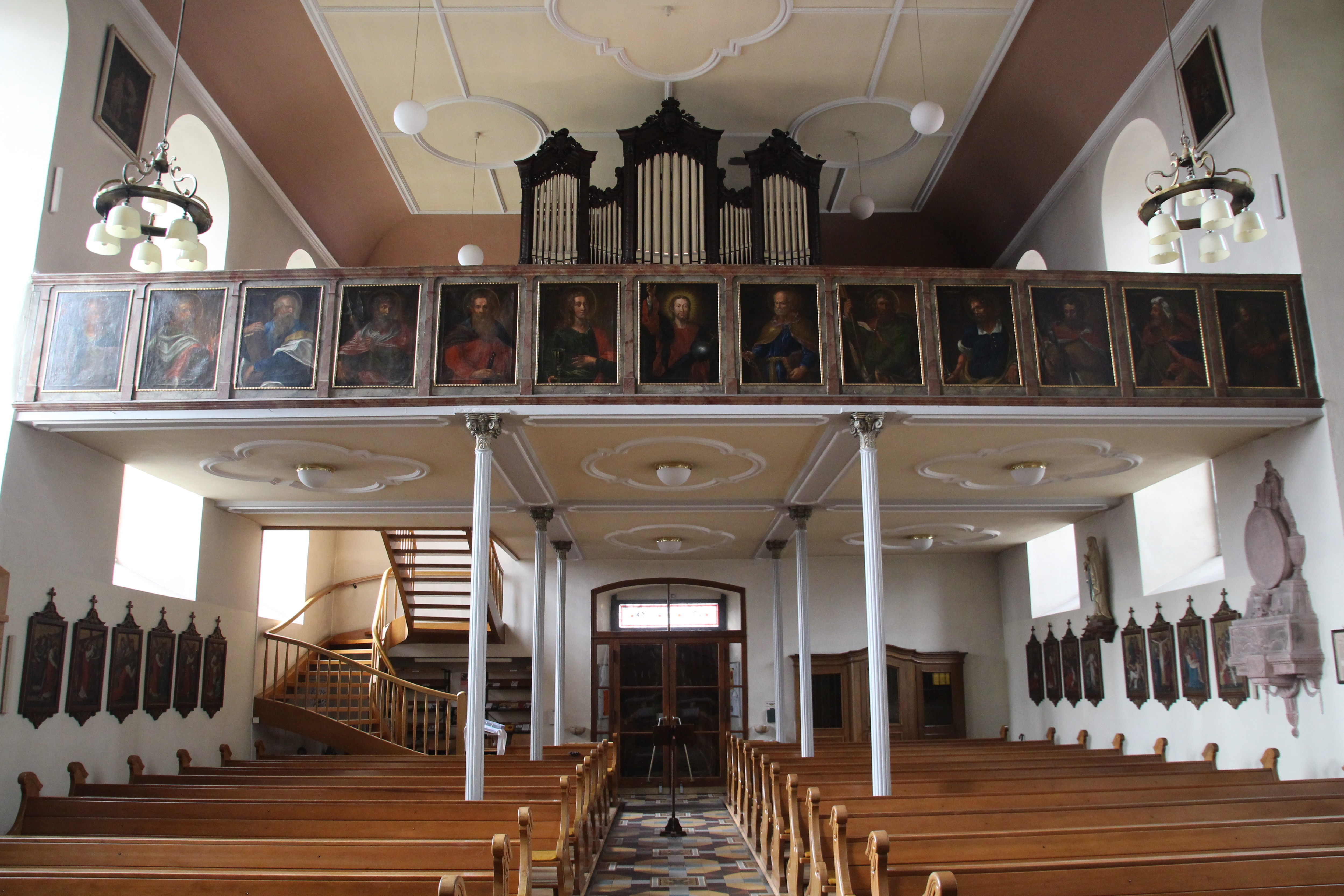 Kirch Heldenberg